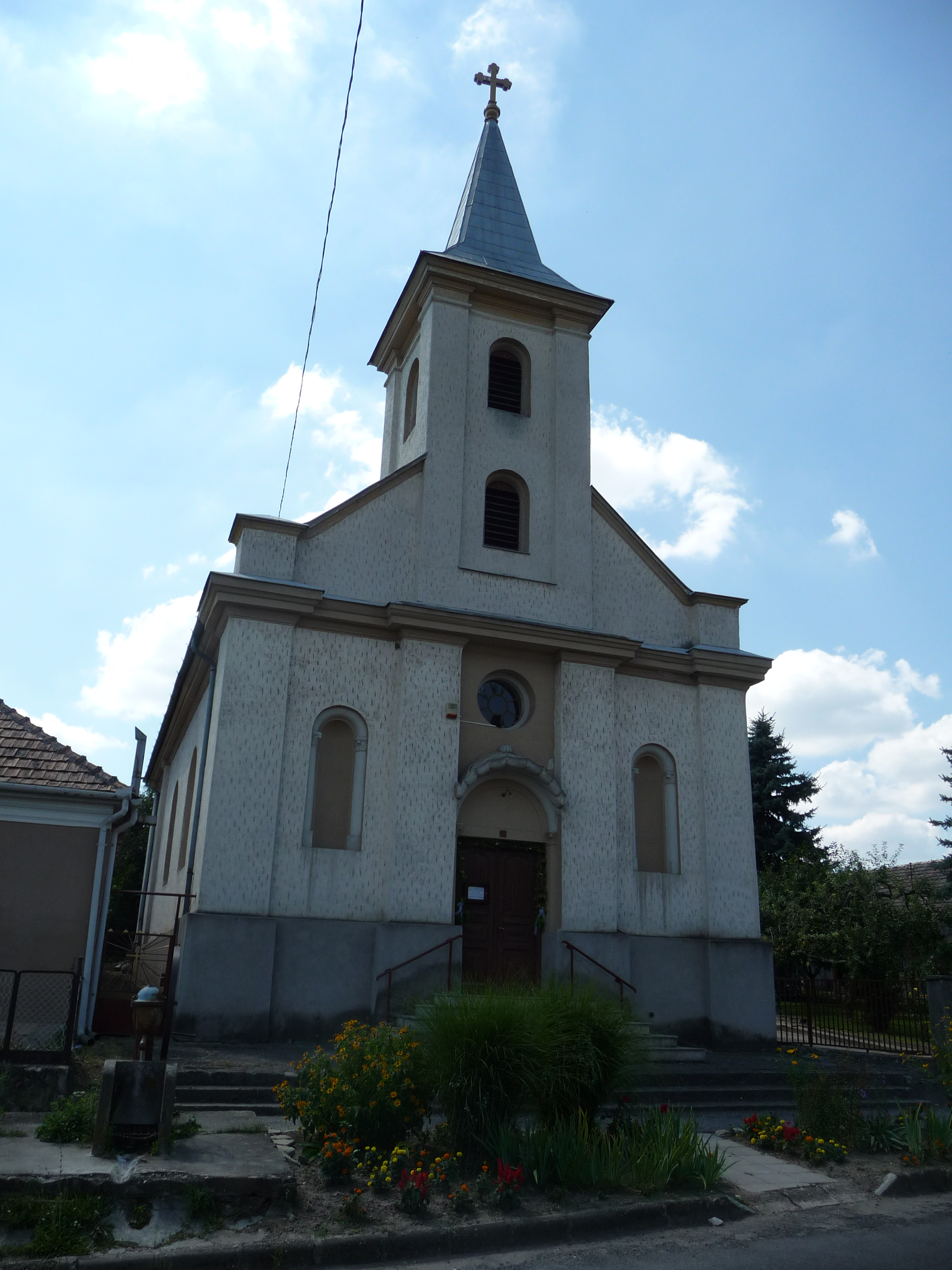 Sziráki római katolikus (Nagyboldogasszony) templom